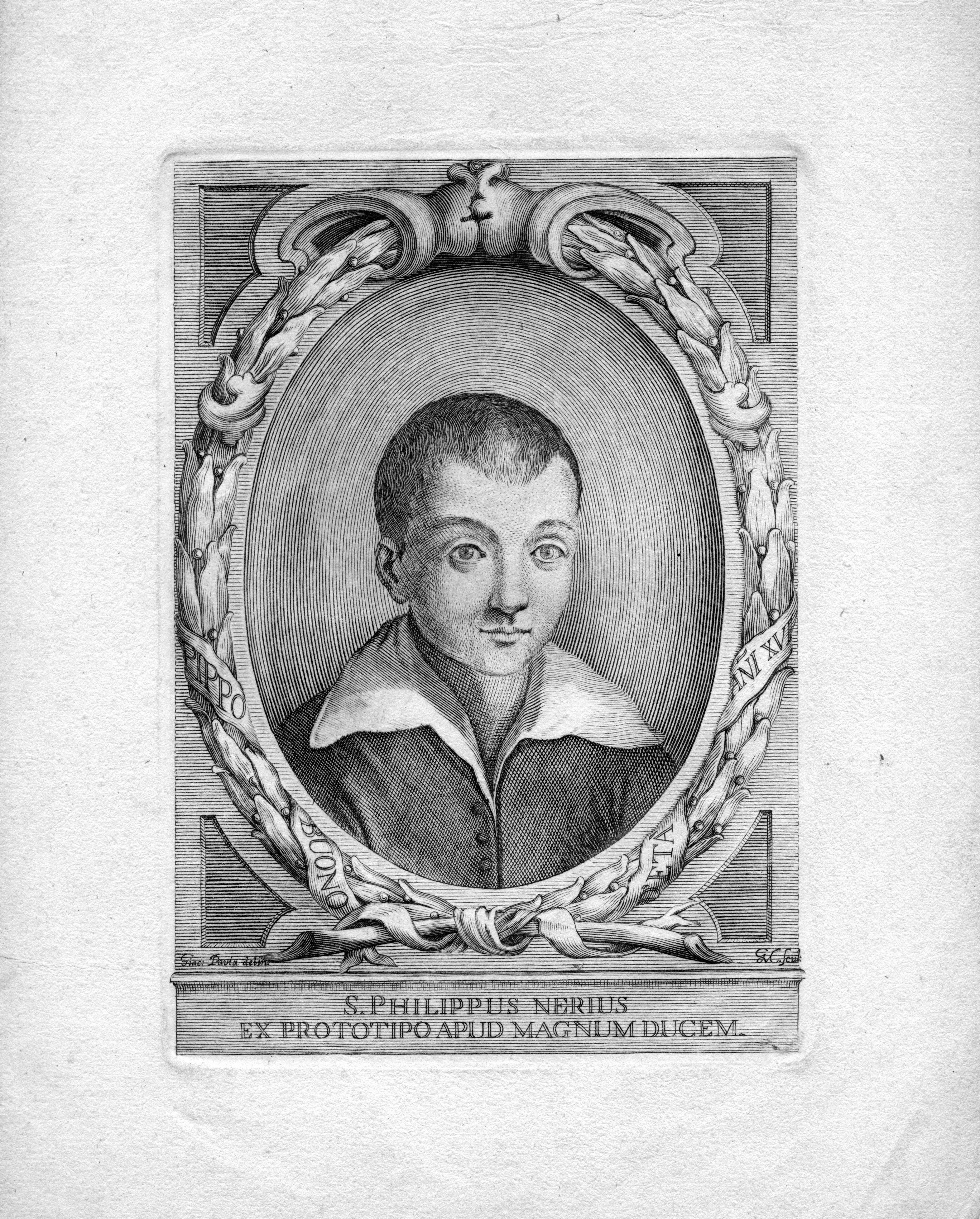 portrait gravé